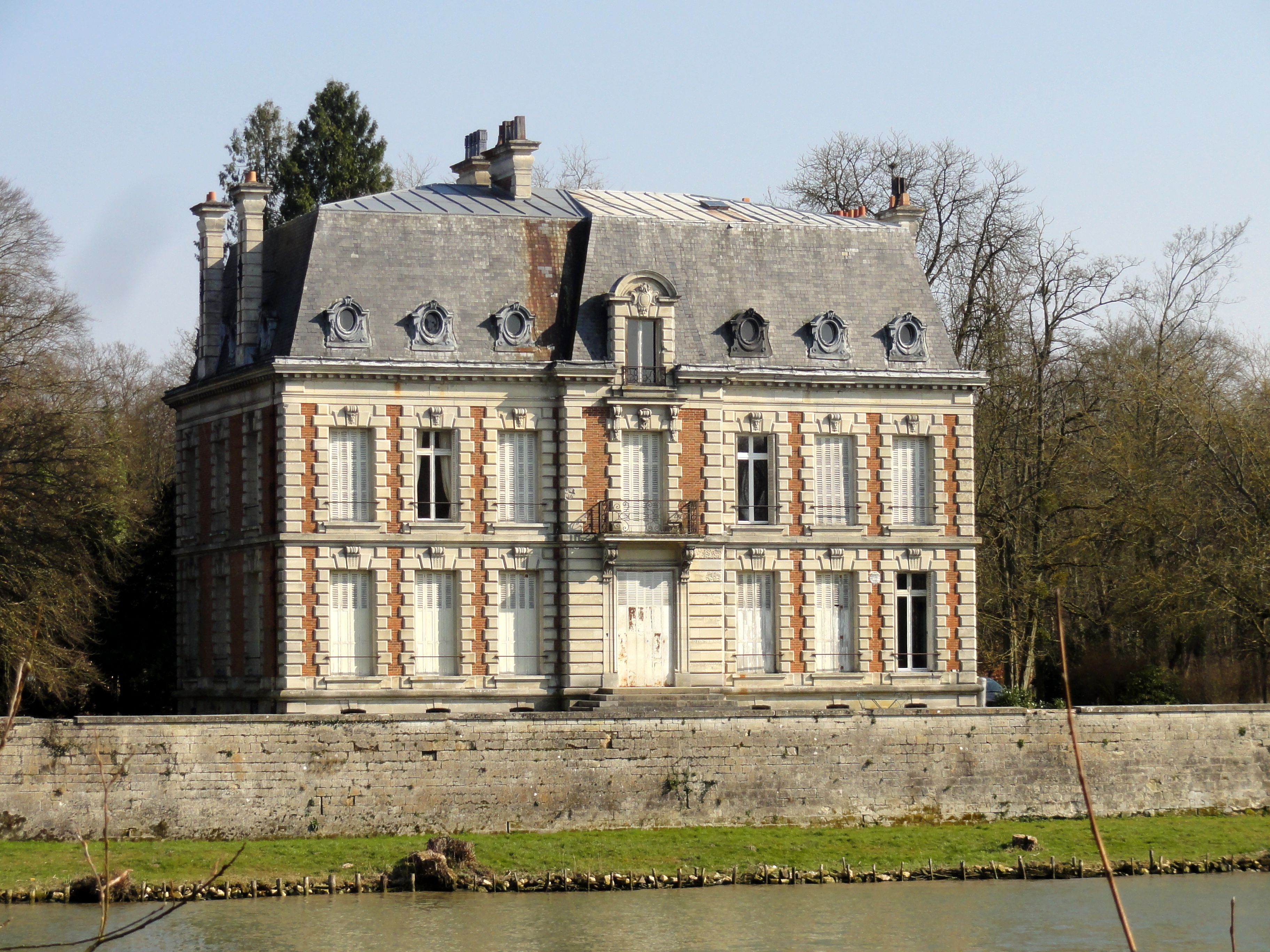 Château Prat.